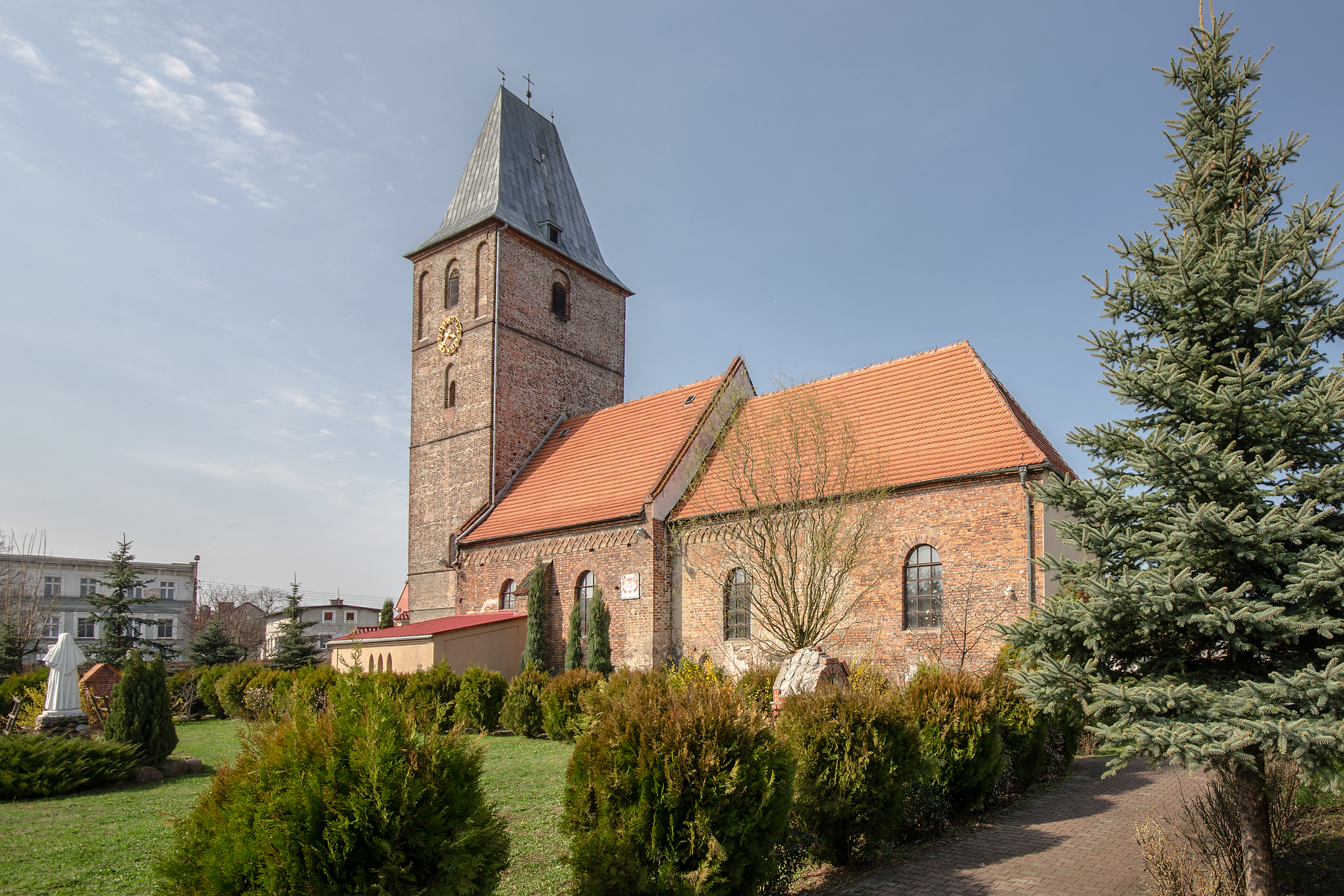 Święta Katarzyna, kościół par. p.w. św. Katarzyny Aleksandryjskiej, 2 poł. XIII, XV, 1743-1748